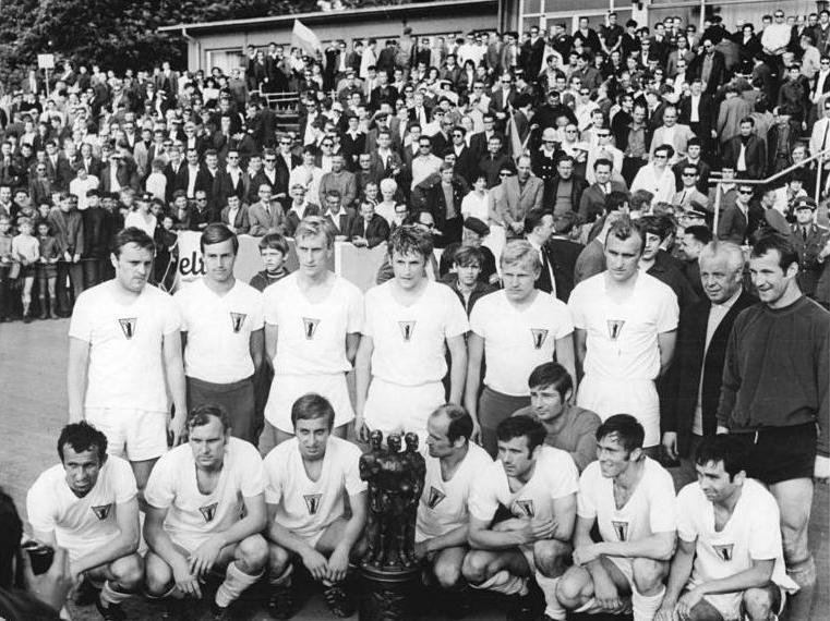 Zentralbild-Deutsche Demokratische Republik 15.6.1970 DDR-Vizemeister FC Vorwärts Berlin wurde FDGB-Fußball-Pokalsieger. Vor 22.000 Zuschauern gewann am 13.6.1970 im Dresdner Rudolf-Harbig-Stadion der DDR-Vizemeister FC Vorwärts Berlin den FDGB-Fußball-Pokal; er gab dem Oberliga-Aufsteiger 1. FC Lok Leipzig mit 4:2 (2:0) das Nachsehen. Beim kommenden Wettbewerb im Europapokal der Pokalsieger wird der FC Vorwärts Berlin die Deutsche Demokratische Republik vertreten. Unser Foto: Die Vorwärts-Spieler stellen sich mit dem Pokal den Fotoreportern. Reporter: Häßler, Copyright: Zentralbild